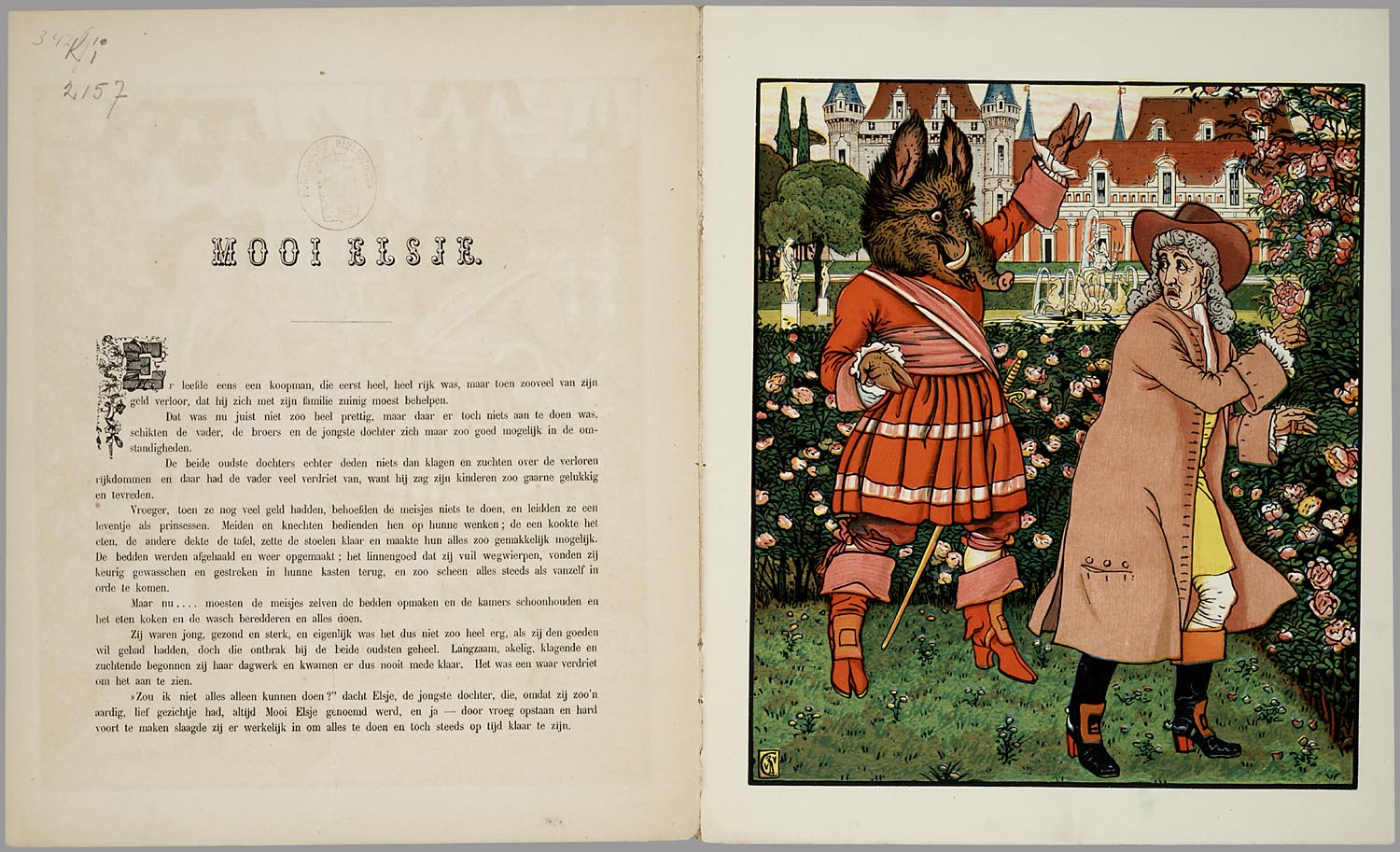 Nieuwe serie // Vertaling van het in hetzelfde jaar in Engeland verschenen boek met de schitterende houtgravures in kleurendruk van Walter Crane, echter zonder vermelding van zijn naam op het omslag en met een qua stijl geheel afwijkende illustratie op de voorkant. Bevat 6 kleurenplaten, waarvan een over twee pagina's, gesigneerd met een kraanvogel en vvc. Het sprookje over de koopmansdochter die gaat houden van een in een monster betoverde prins verscheen oorspronkelijk in 1756 in het 'Magasin des enfans'. Belle en het beest 6 bl., 6 bl. pl : gekl. houtgrav // De keerzijde der bladen is onbedrukt // De litho op de voorkant is een 'steendruk v.Harms & Co. Amst' // Vert. van Beauty and the beast / Walter Crane, Routledge, 1874 // Ingekleurd : f 0,90 Prentenboeken // Sprookjes